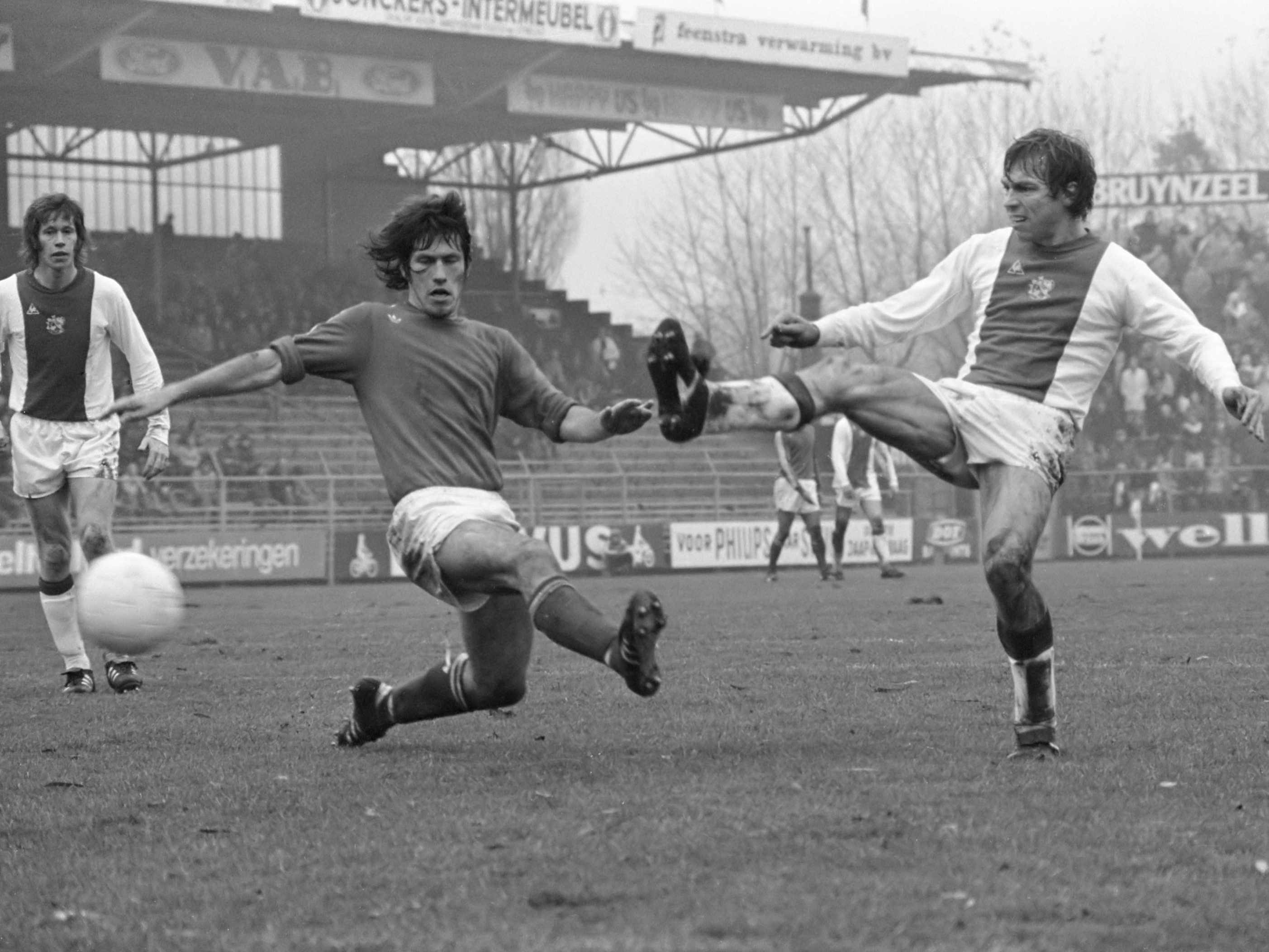 Ajax tegen Go Ahead Eagles 3-0, Jan Mulder (rechts) scoort 3 november 1974